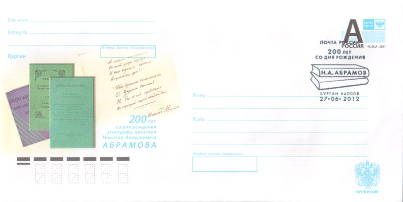 Абрамов Николай Алексеевич, почтовый конверт